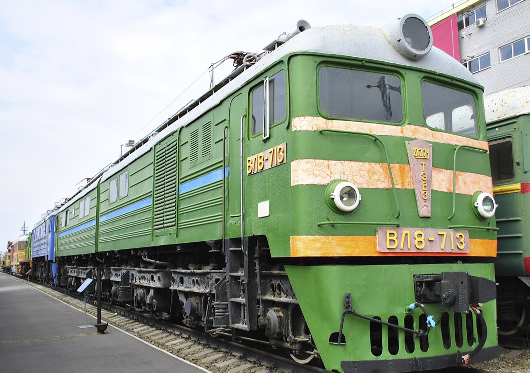 Электровоз построен в 1963 году Тбилисским электровозостроительным заводом